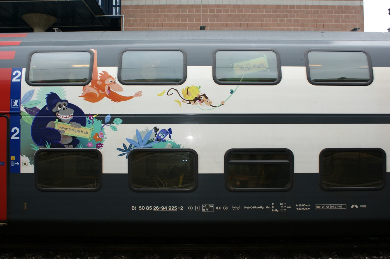 IC 2000 Familienwagen Bt 50 85 26-94 925-2 mit neuer Einrichtung und Beklebung aussen.